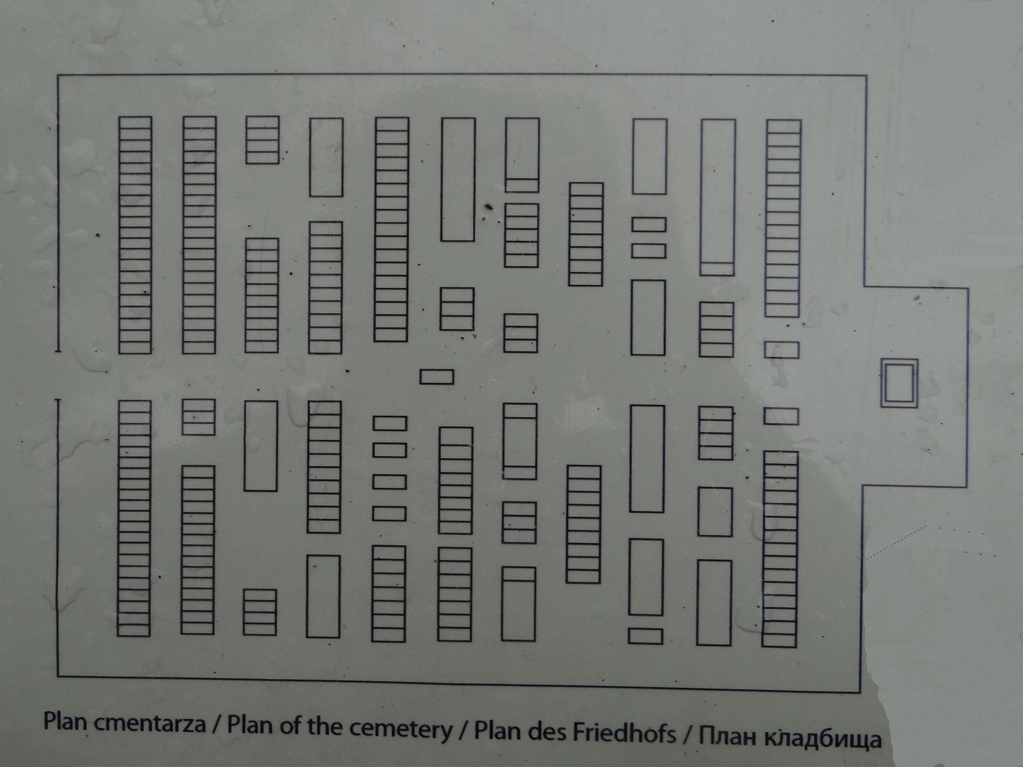 Cmentarz wojenny nr 140 - Tursko-Zapotocze (plan)